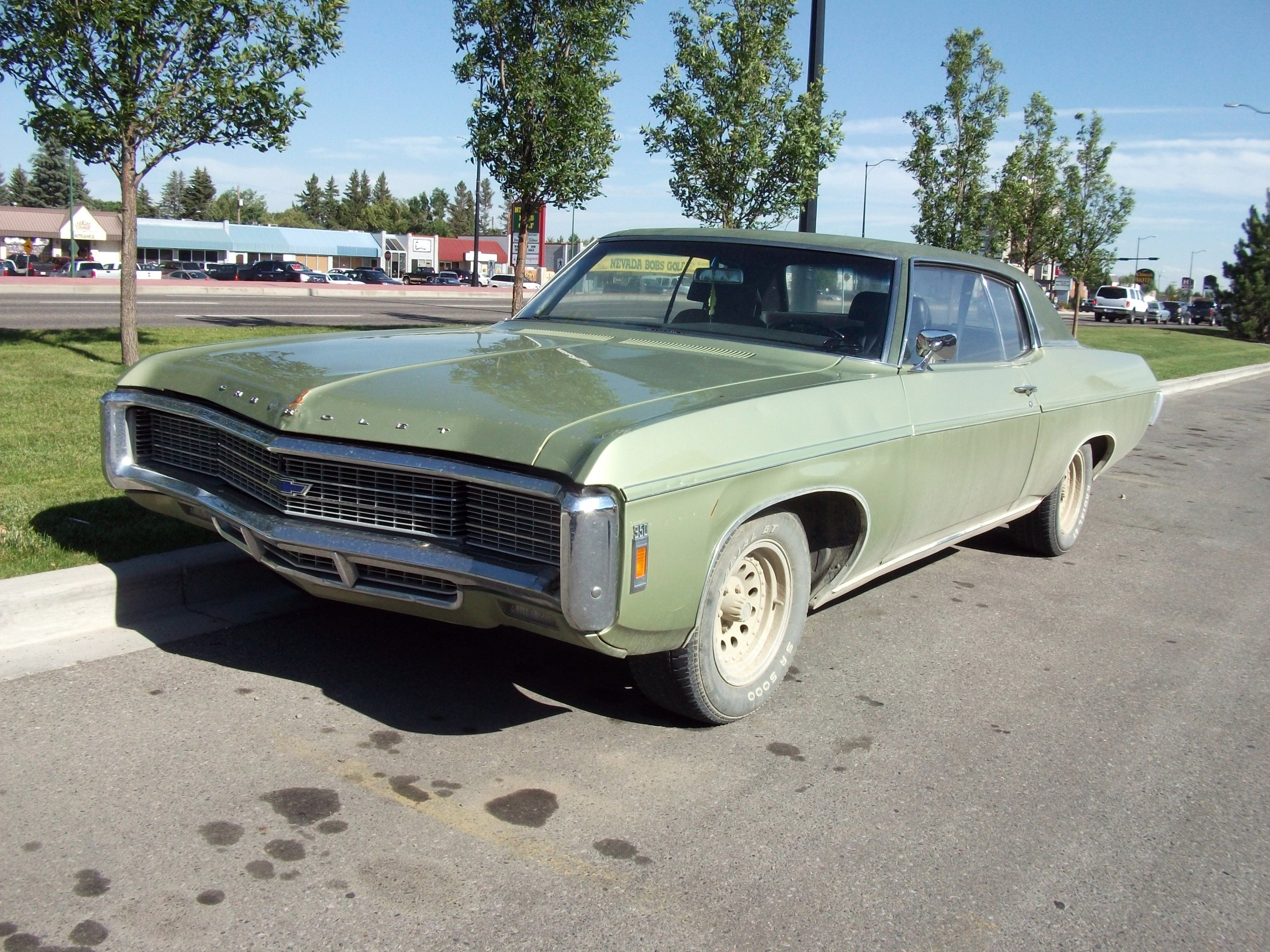 1969 Chevrolet Caprice